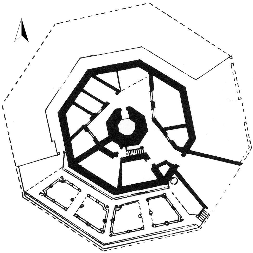 Grundriss der Burg Egisheim im Jahr 1790